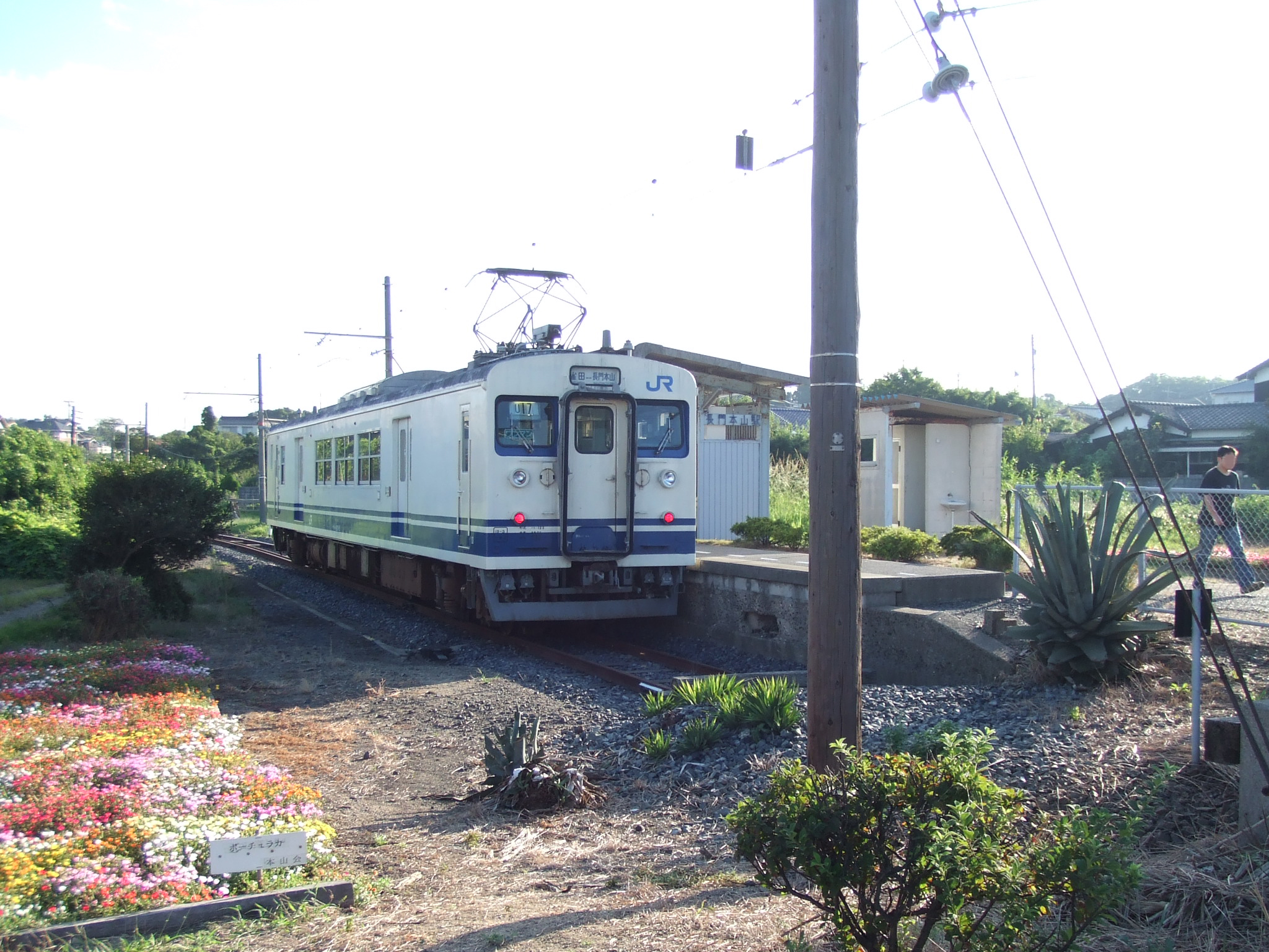 長門本山駅 終端側からみた駅構内